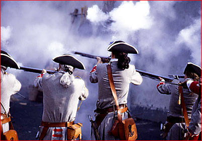 Rievocazione Storica della Battaglia della Marsaglia - Volvera - To - Italy